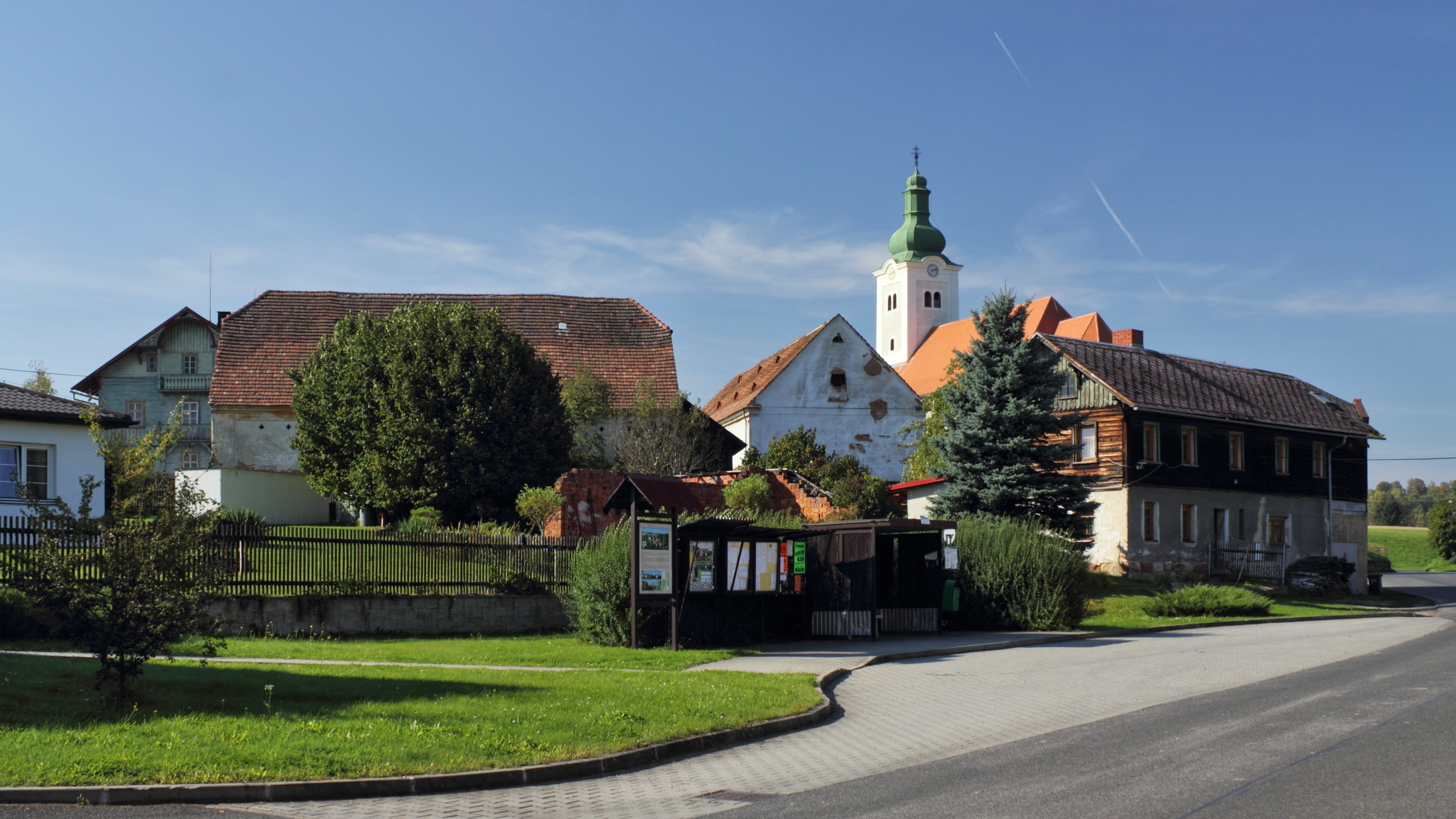 Střed obce Dubnice, v pozadí kostel Narození Panny Marie v Dubnici